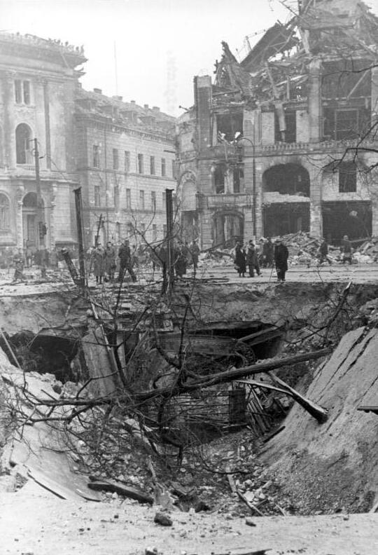 Berlin, zerstörter U-Bahnhof Hausvogteiplatz Scherl: ADN-Zentralbild/Archiv II. Weltkrieg 1939-45 Bombenschäden in Berlin am 3.2.45. Bombentreffer auf die U-Bahn-Station Hausvogteiplatz. (Hoffmann)